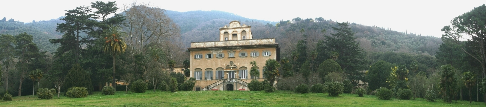 M.Bianucci - Villa e Parco di Corliano